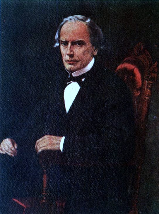 José Agustín de Dios Edwards Ossandón (La Serena, 2 de abril de 1815 - Limache, 2 de enero de 1878), empresario y político chileno. Hijo del fundador de la familia Edwards en Chile, George Edwards Brown e Isabel Ossandón Iribarren. Agustín Edwards casó con Juana Ross Edwards con quien tuvo 7 hijos entre ellos Agustín Edwards Ross.